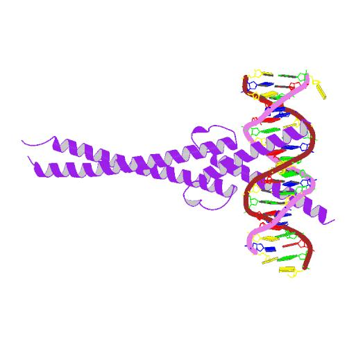 MYC protein (cMYC)